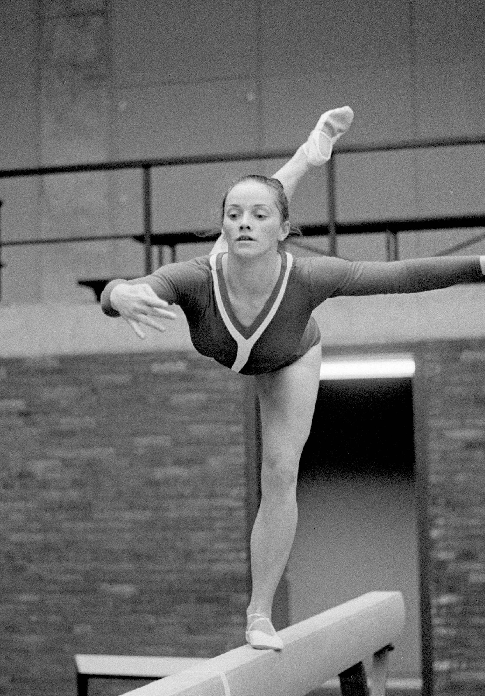 Dames turninterland Nederland tegen Zuid-Afrika; Ans Smulders (nee van Gerwen) in aktie